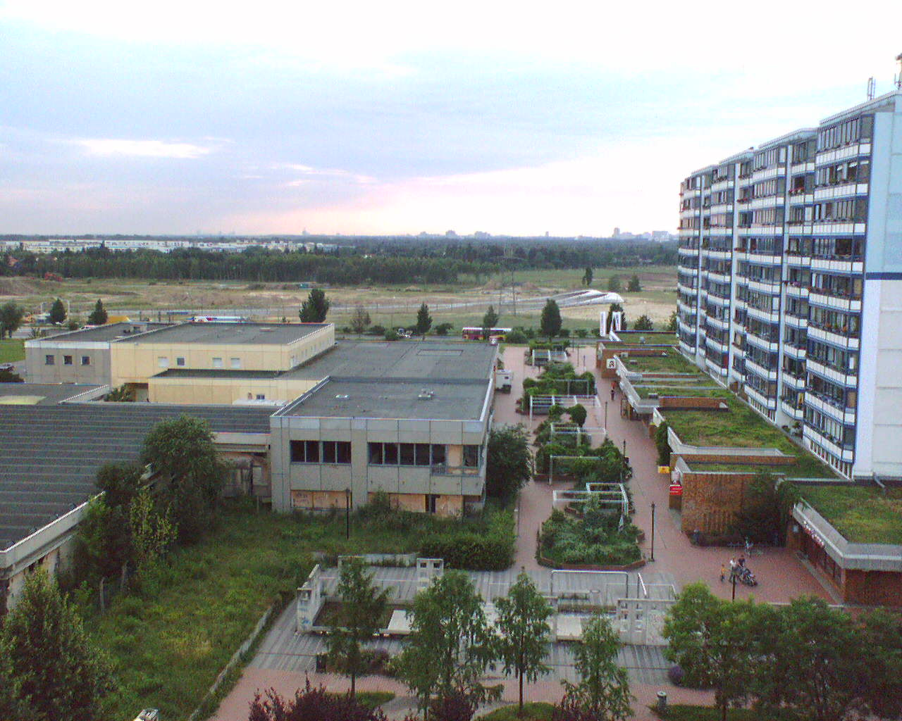 Einkaufspassage Neubaugebiet Altglienicke, Blick Richtung Rudow